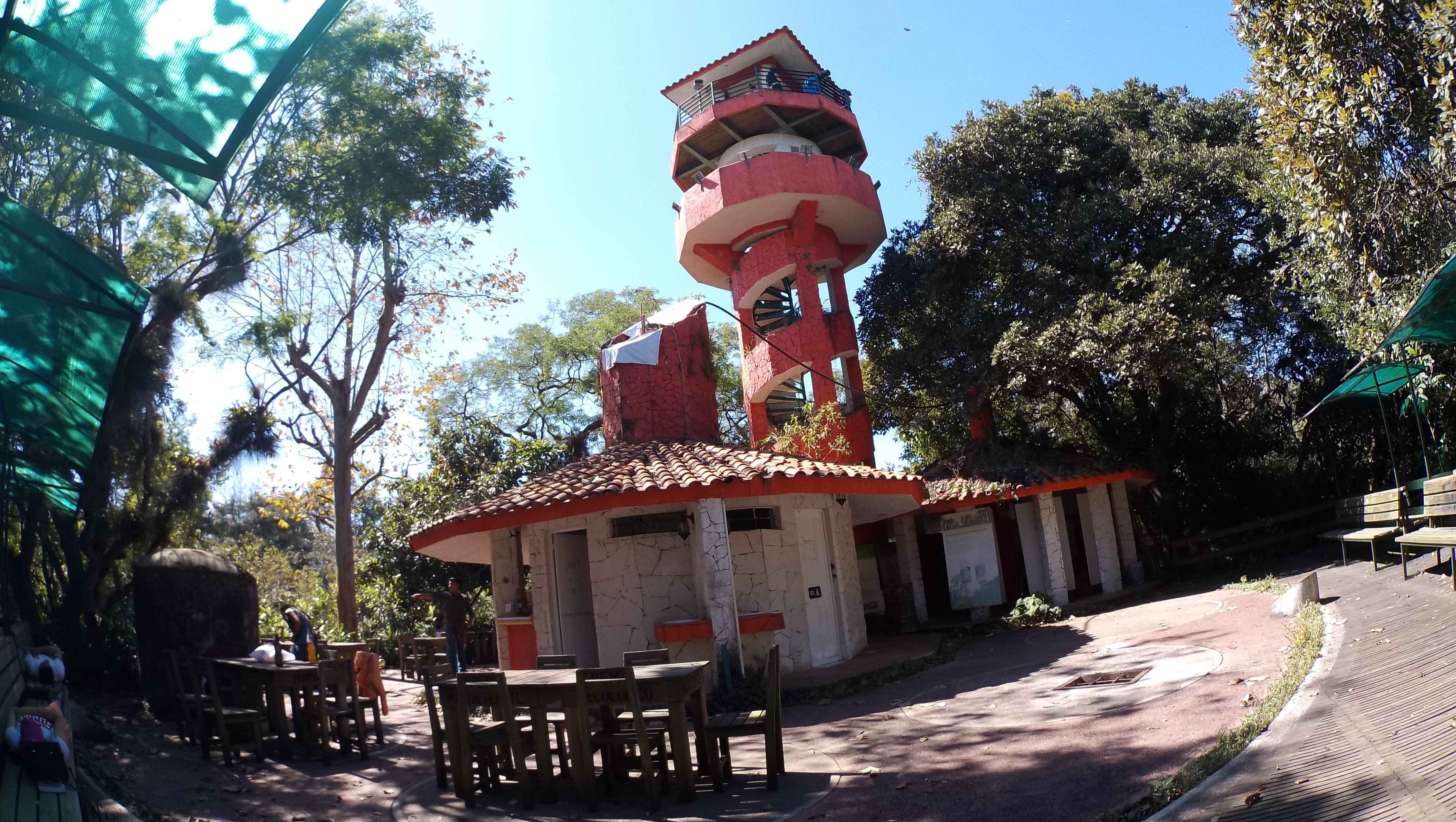 En el cerro del Macuiltépetl en Xalapa Veracruz.